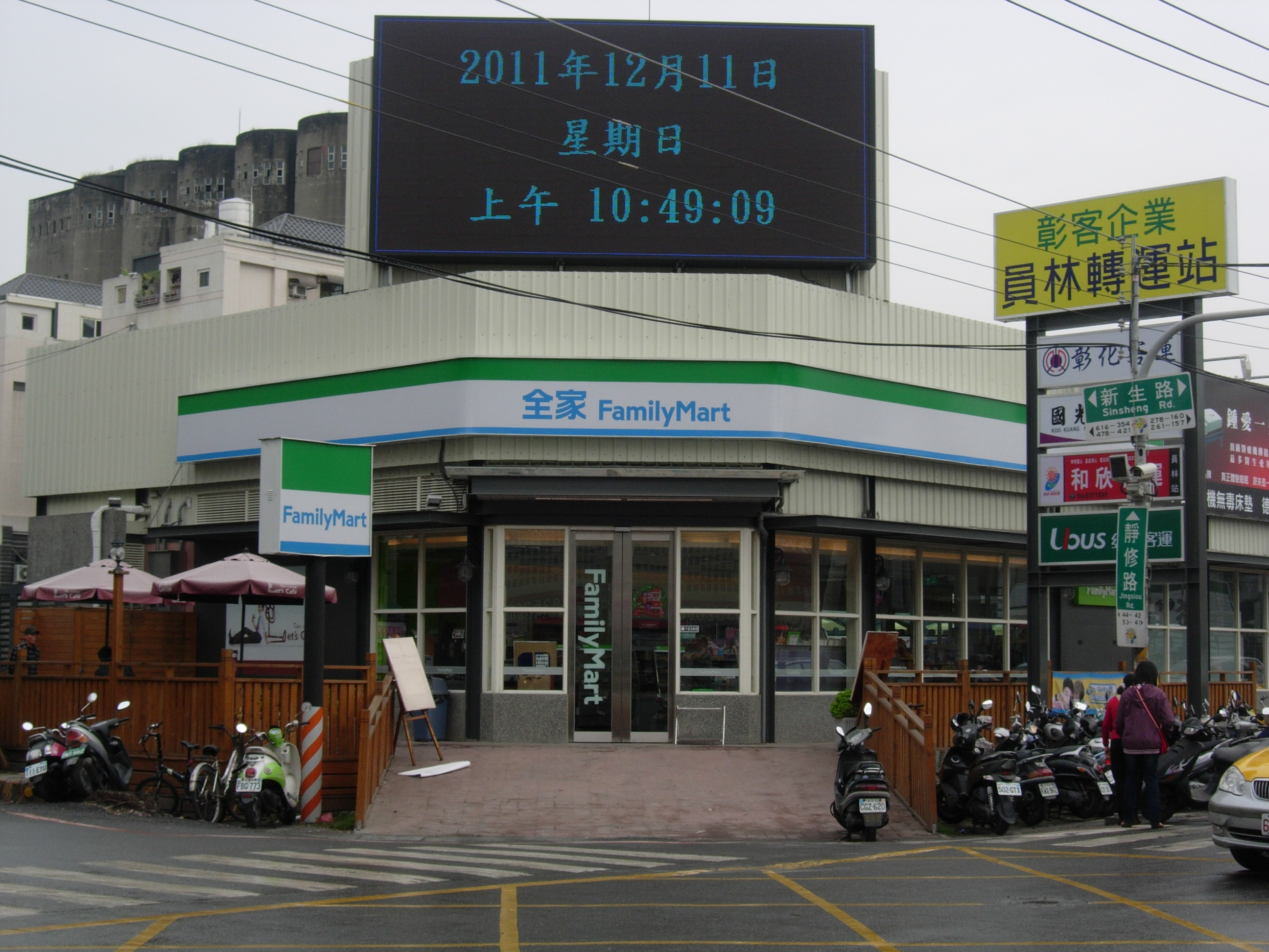 中文（台灣）: 員林轉運站。